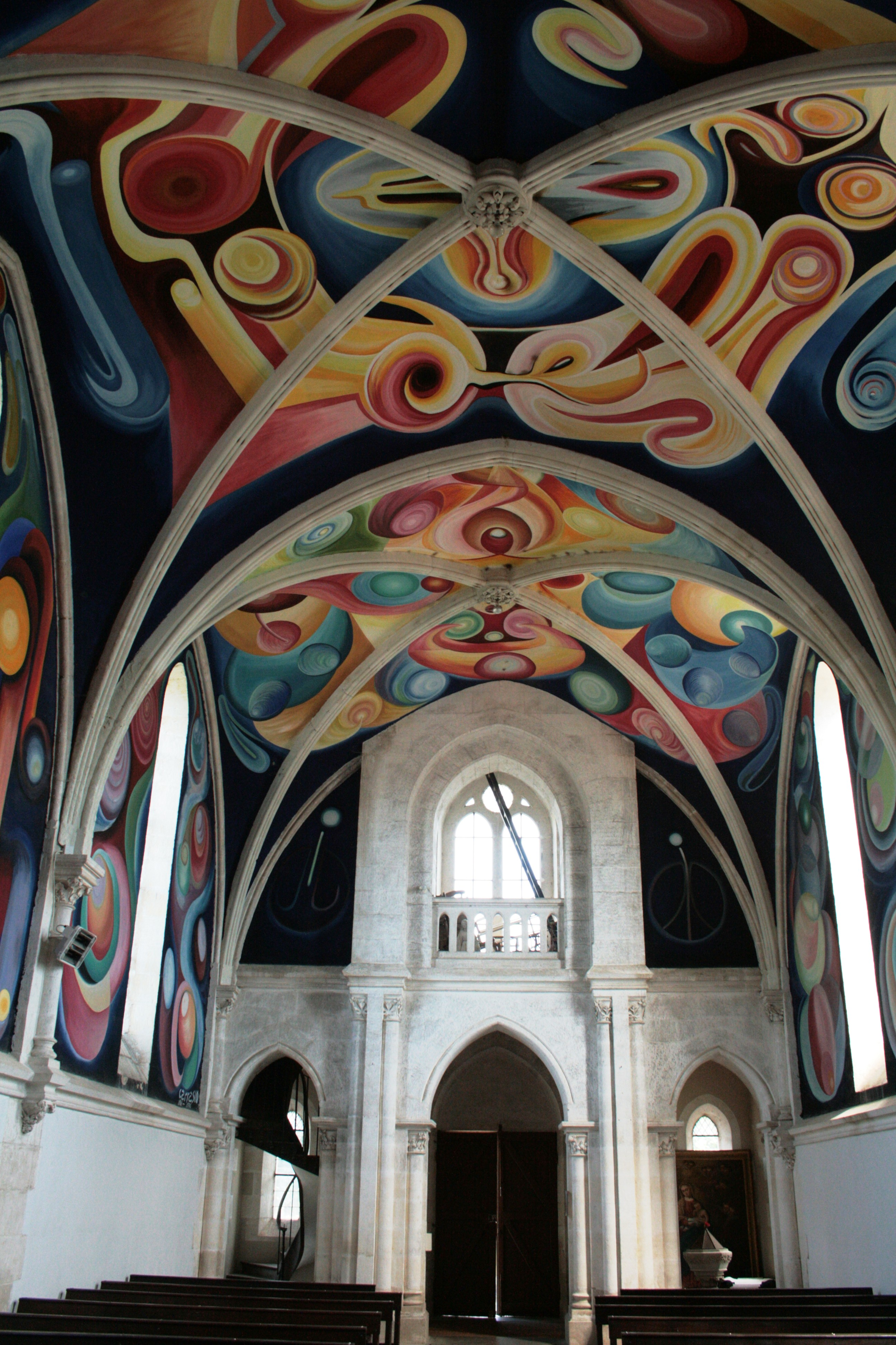 Jorge Carrasco, peintre bolivien actif et mort en France (1919-2006). Fresques de l'église du Menoux (Indre, France), 1968-1976. Vue générale vers le porche.